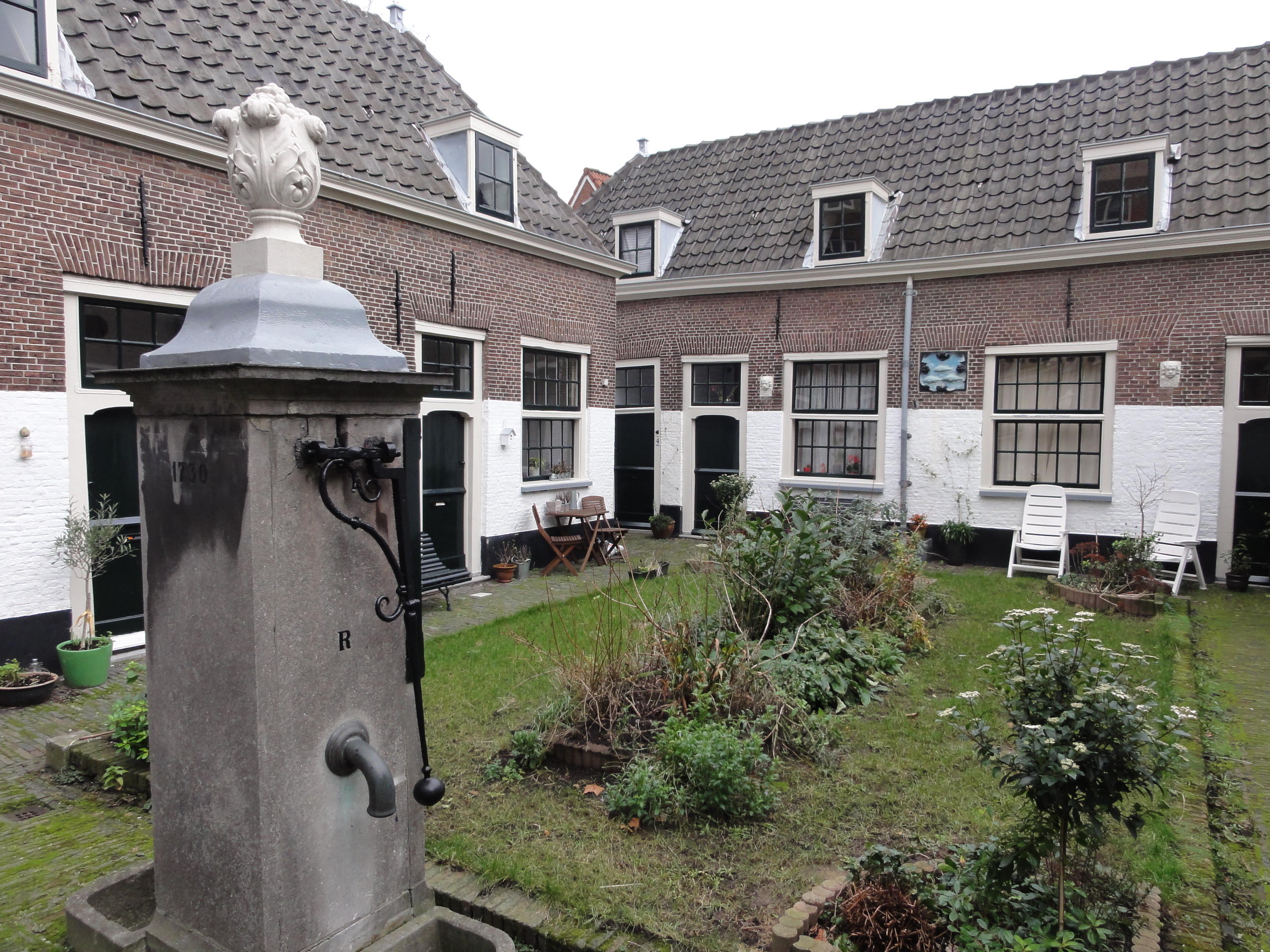 Schachtenhofje aan de Middelstegracht 27 te Leiden